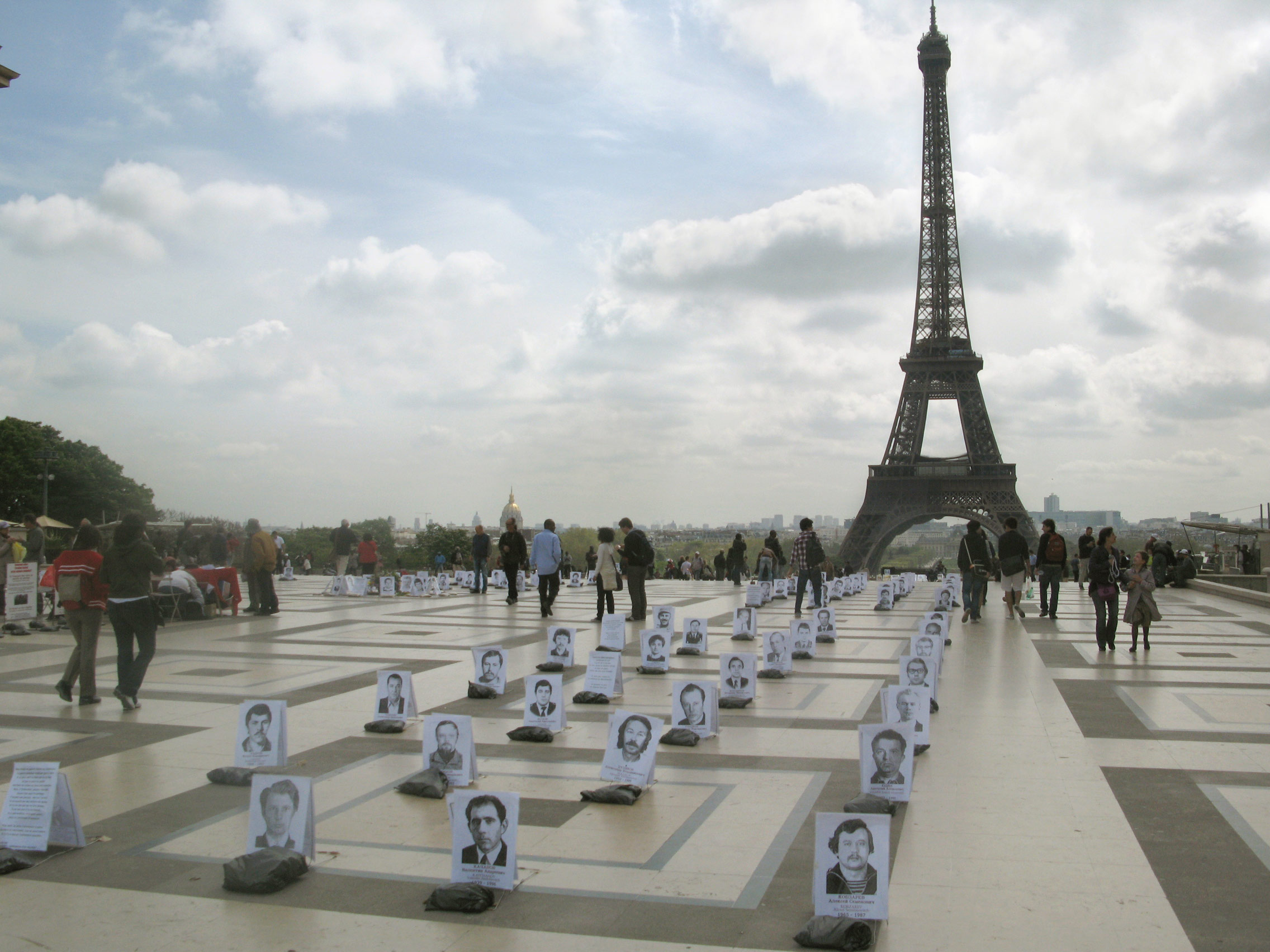 Manifestation de Independent WHO sur le parvis des droits de l'homme à Paris le 26 avril 2010. Avec des portraits de liquidateurs de la catastrophe de Tchernobyl.